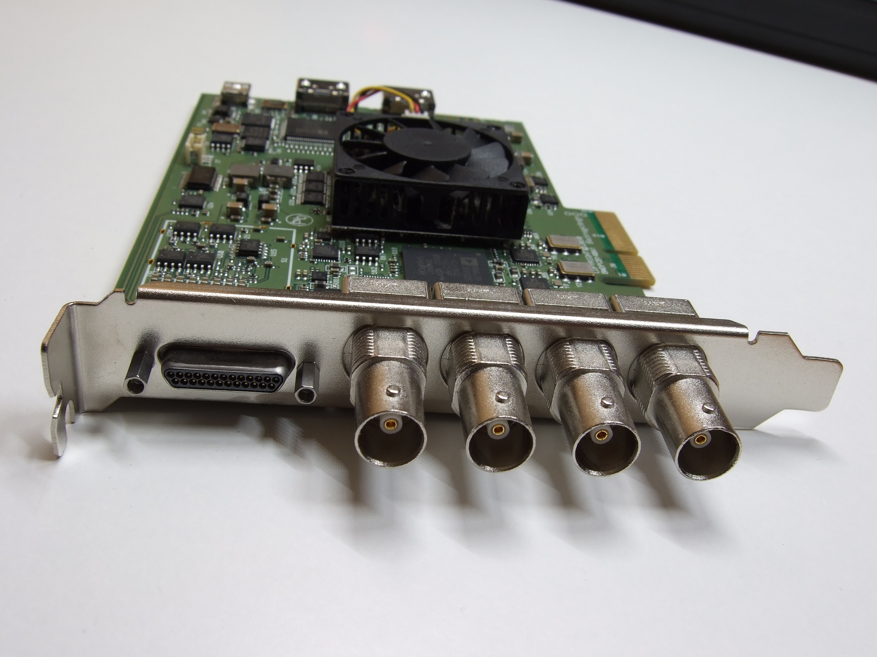 Decklink_DSCF4439